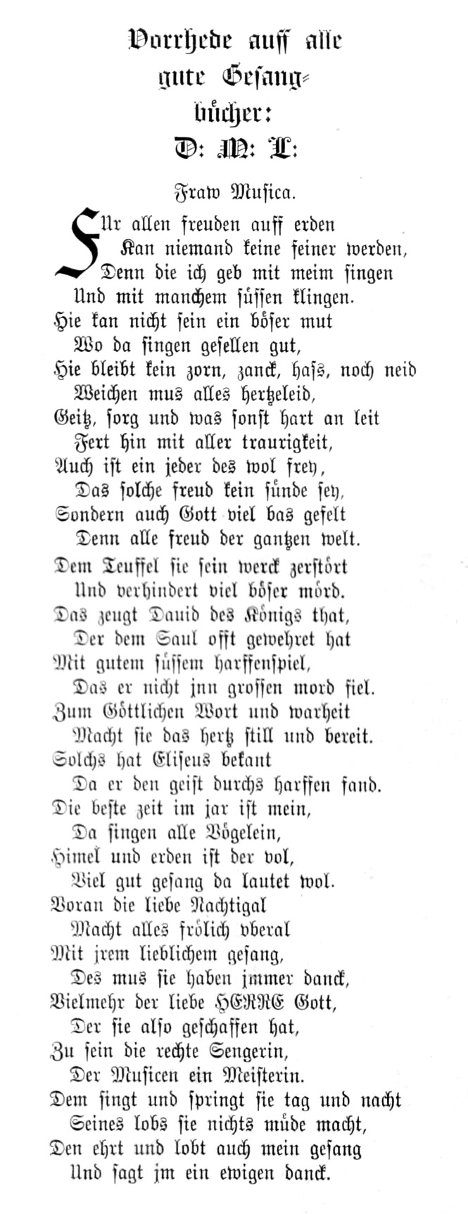 Martin Luther: Vorrede auf alle guten Gesangbücher, Reimspruch, darin Die beste Zeit im Jahr ist mein (EG 319)